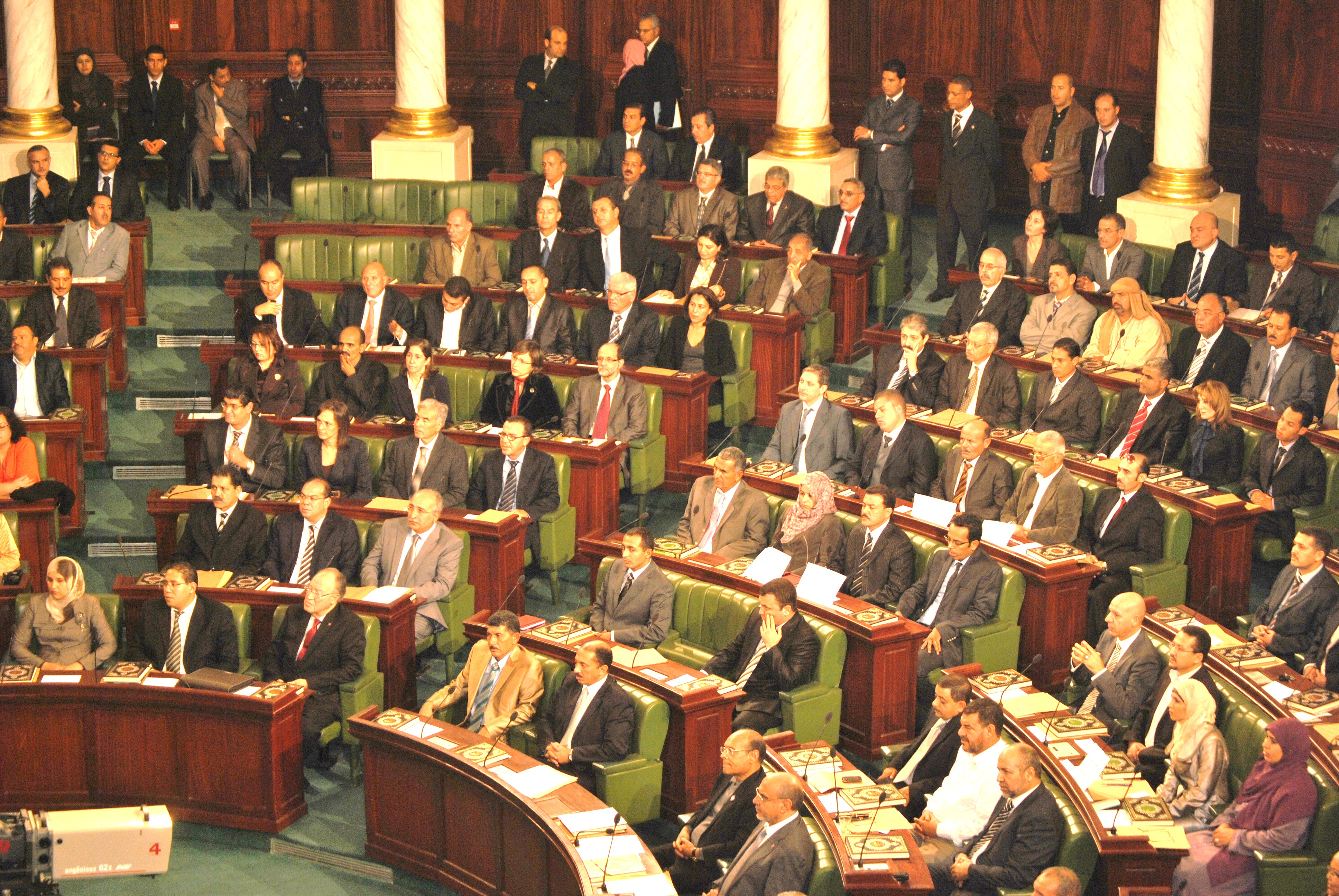 Première séance de l'assemblée constituante déroulée le 22 novembre 2011 au palais du Bardo.